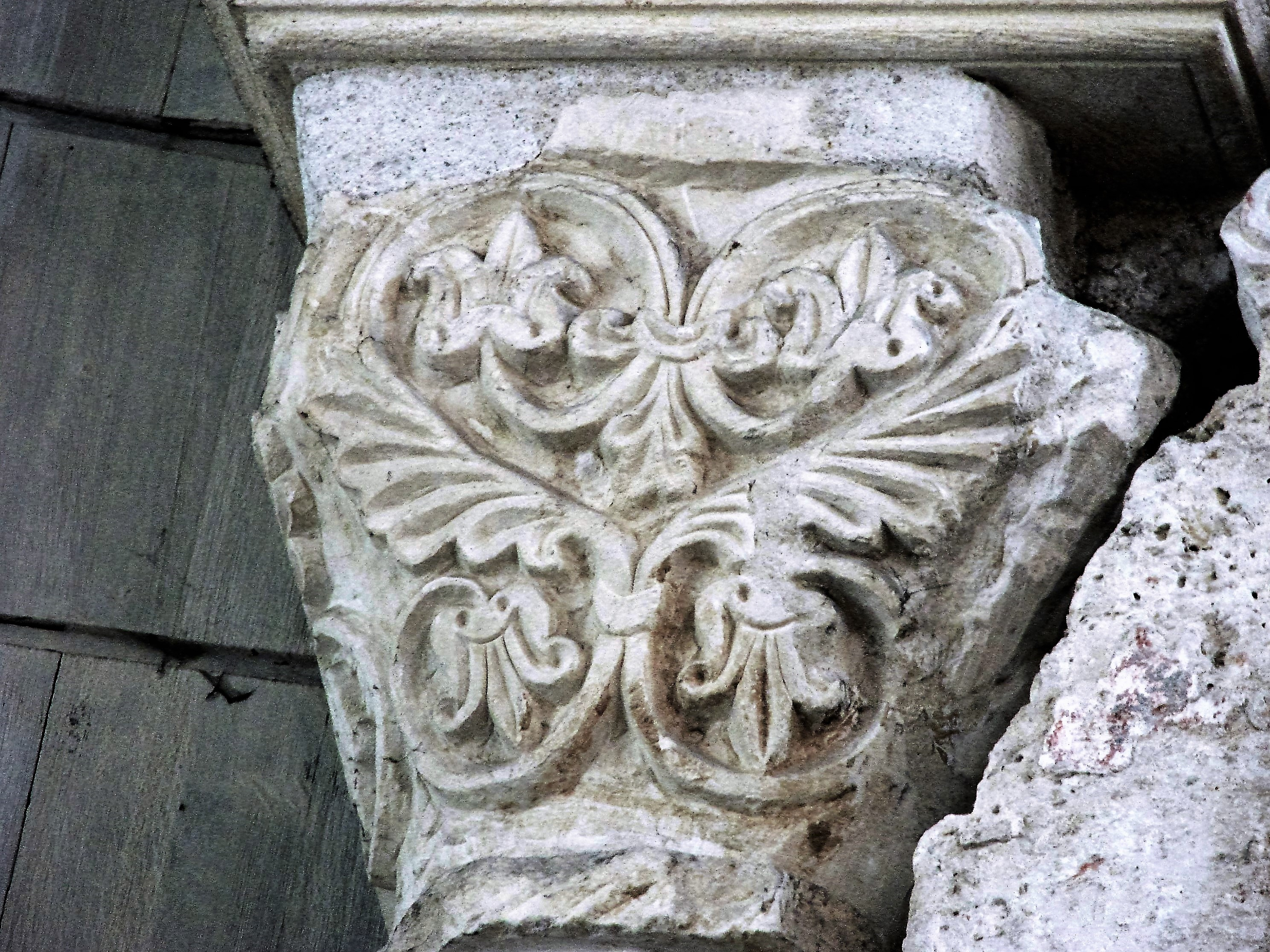 Abbatiale Notre-Dame de Bernay (Eure), chapiteau sculpté